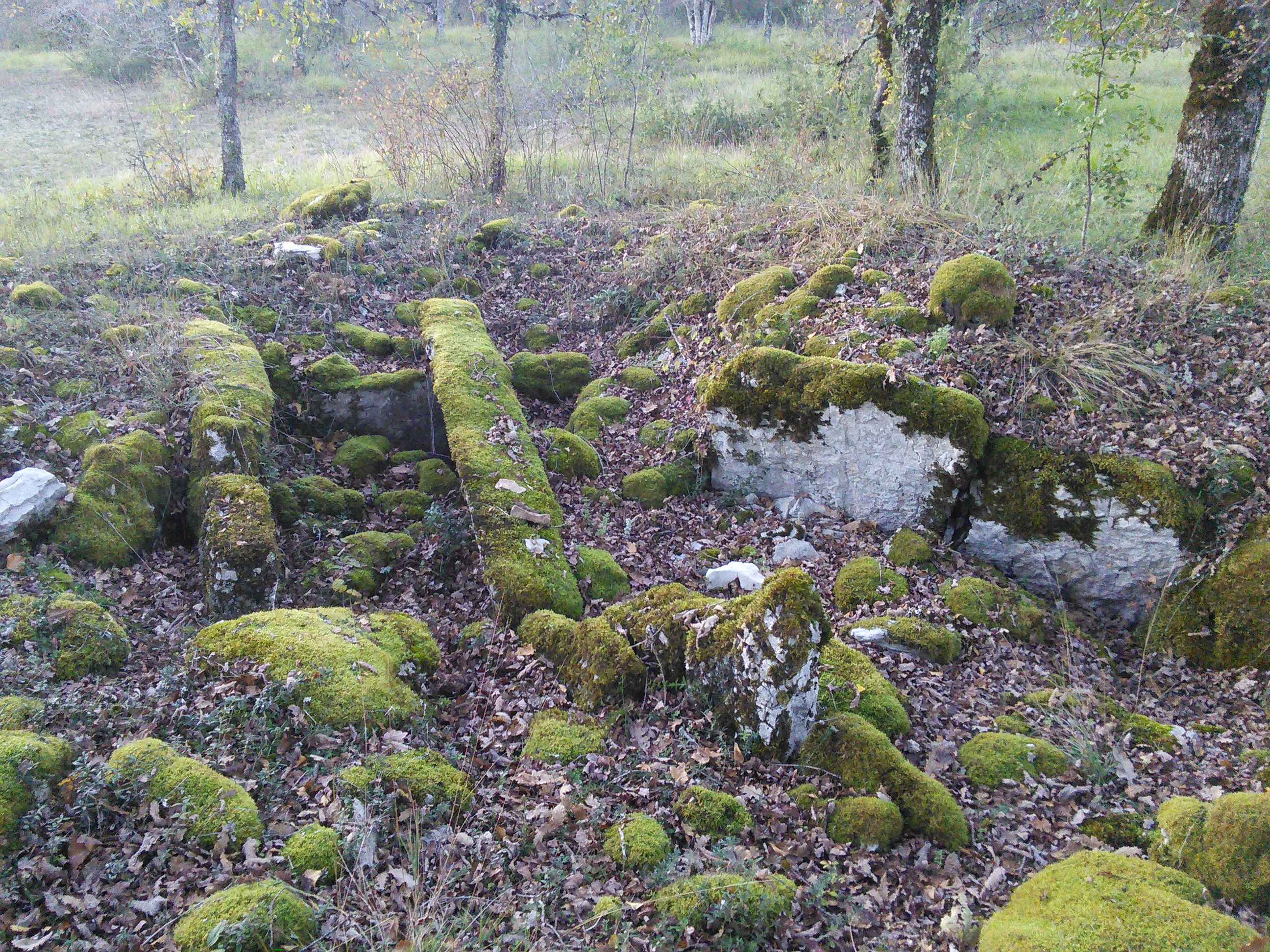 Dolmens adjacents